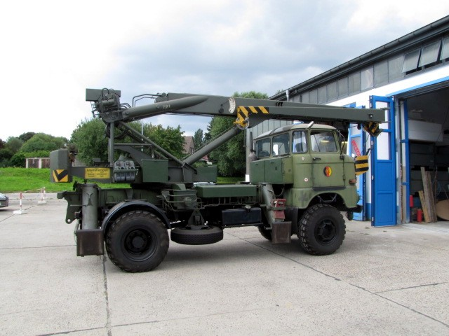 Einer der wenigen Exemplare des ADK 70 Allrad mit Niederdruckreifen Typ U 27 16-20 ND als Fahrzeug der NVA. Nur das Reserverad war eine normale Strassenausführung, die Niederdruck-Bereifung war dafür zu groß. Basis war der IFA W50, der Krahnaufbau kam aus dem VEB Schwermaschinenbau KARL MARX in Babelsberg.